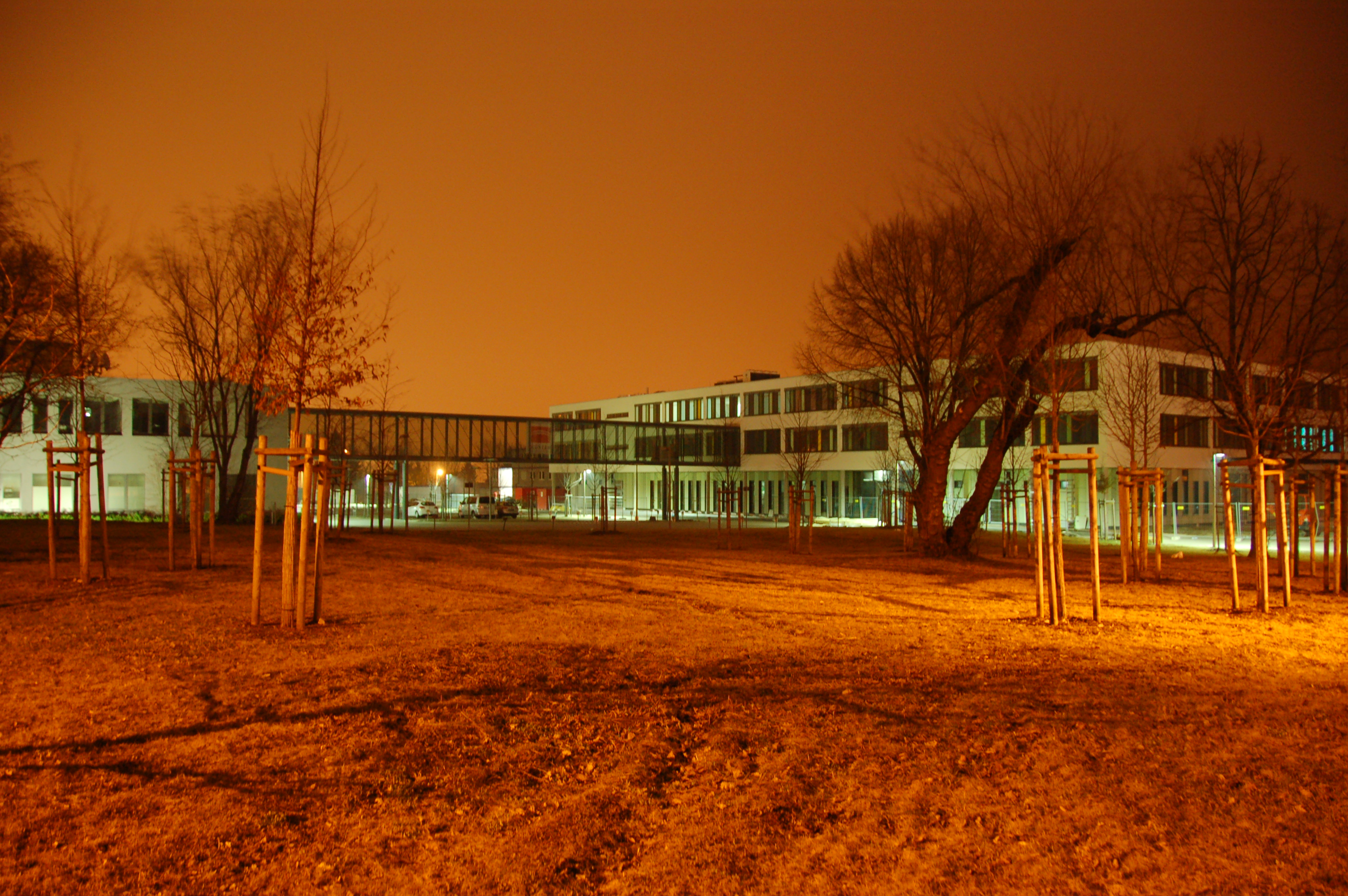 Erweiterungsbau des Erfurter KinderMedienZentrums bei Nacht